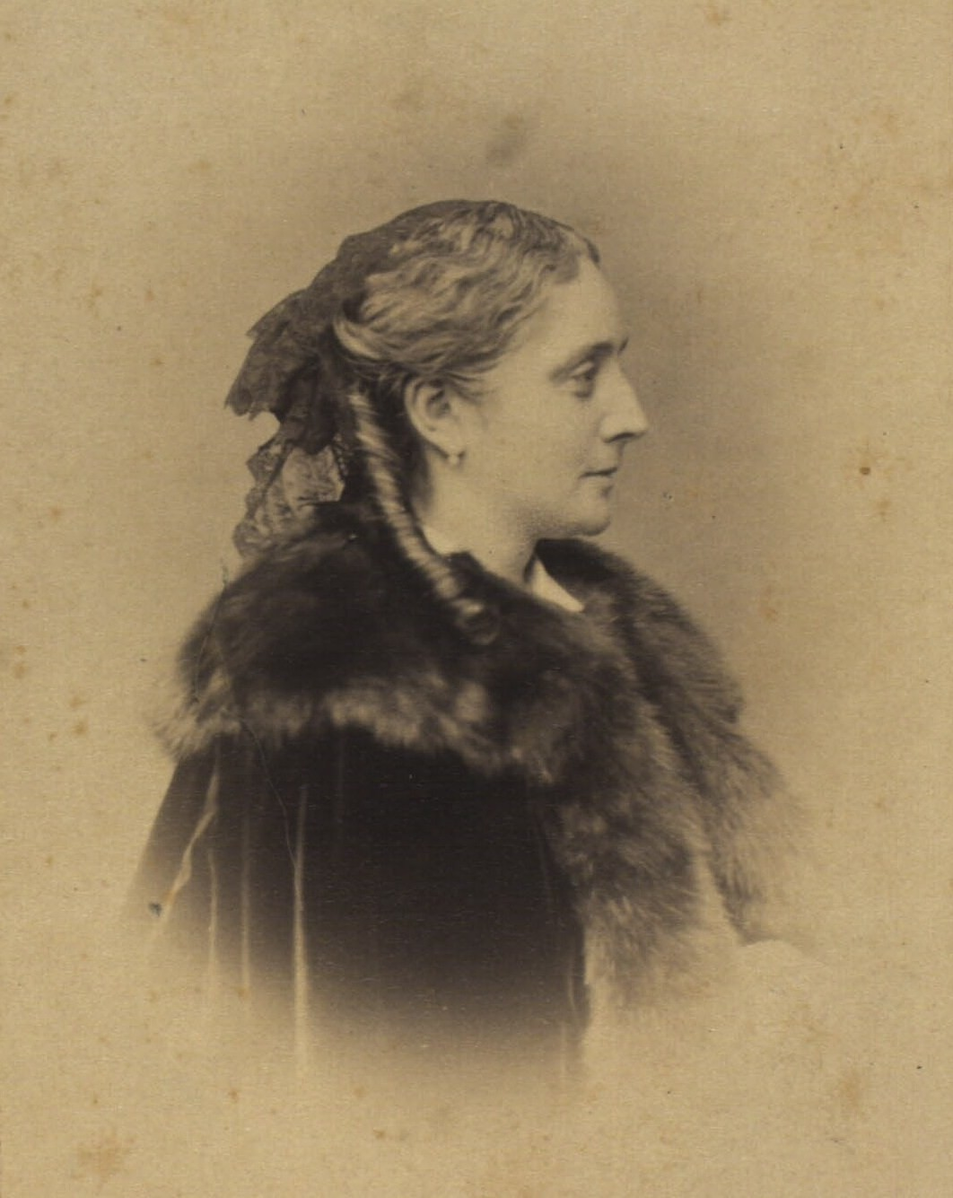 Варвара Сергеевна Гагарина (1825—1893), замужем за бароном Плессеном, датским посланником.